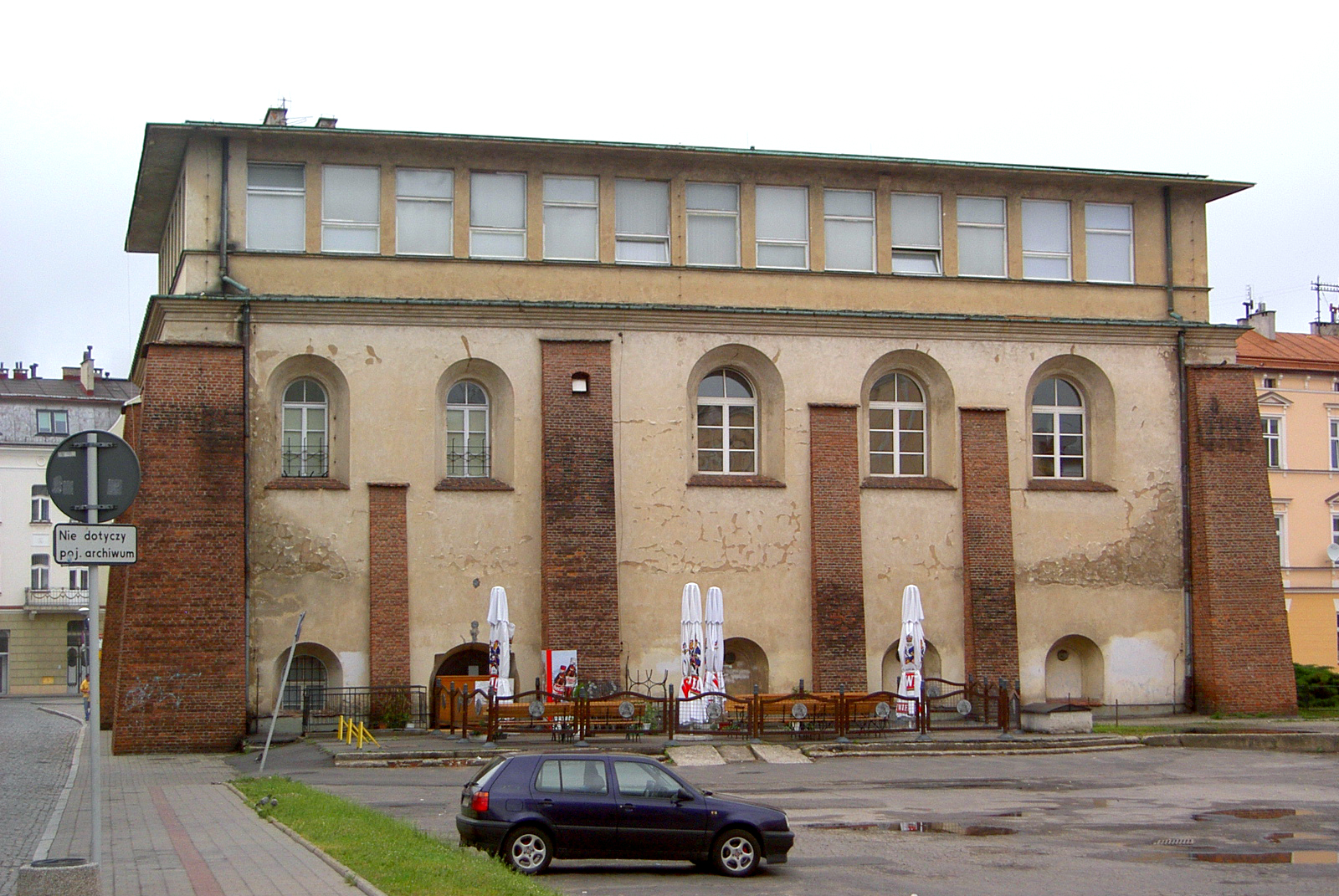 New Town Synagogue in Rzeszów, Poland • Synagoga Nowomiejska w Rzeszowie